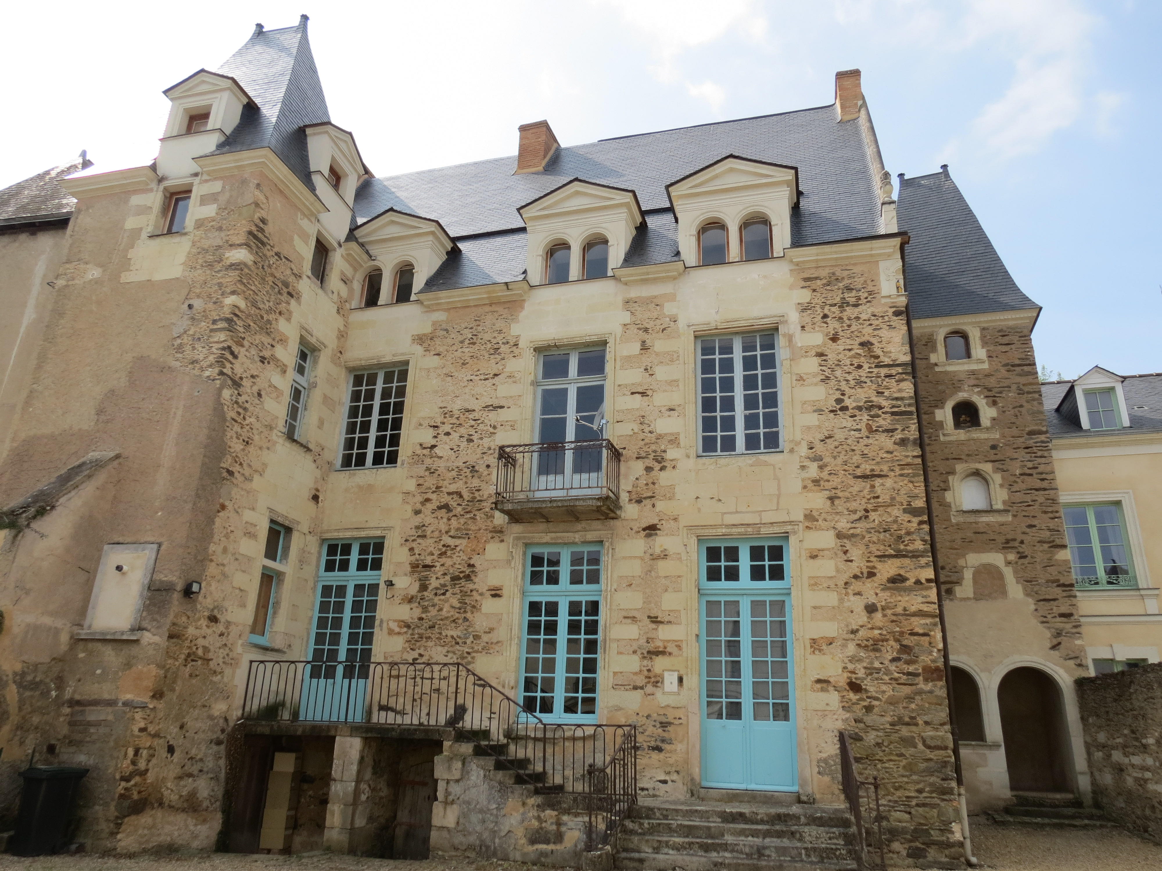 Hôtel de Lantivy, Château-Gontier, Mayenne.